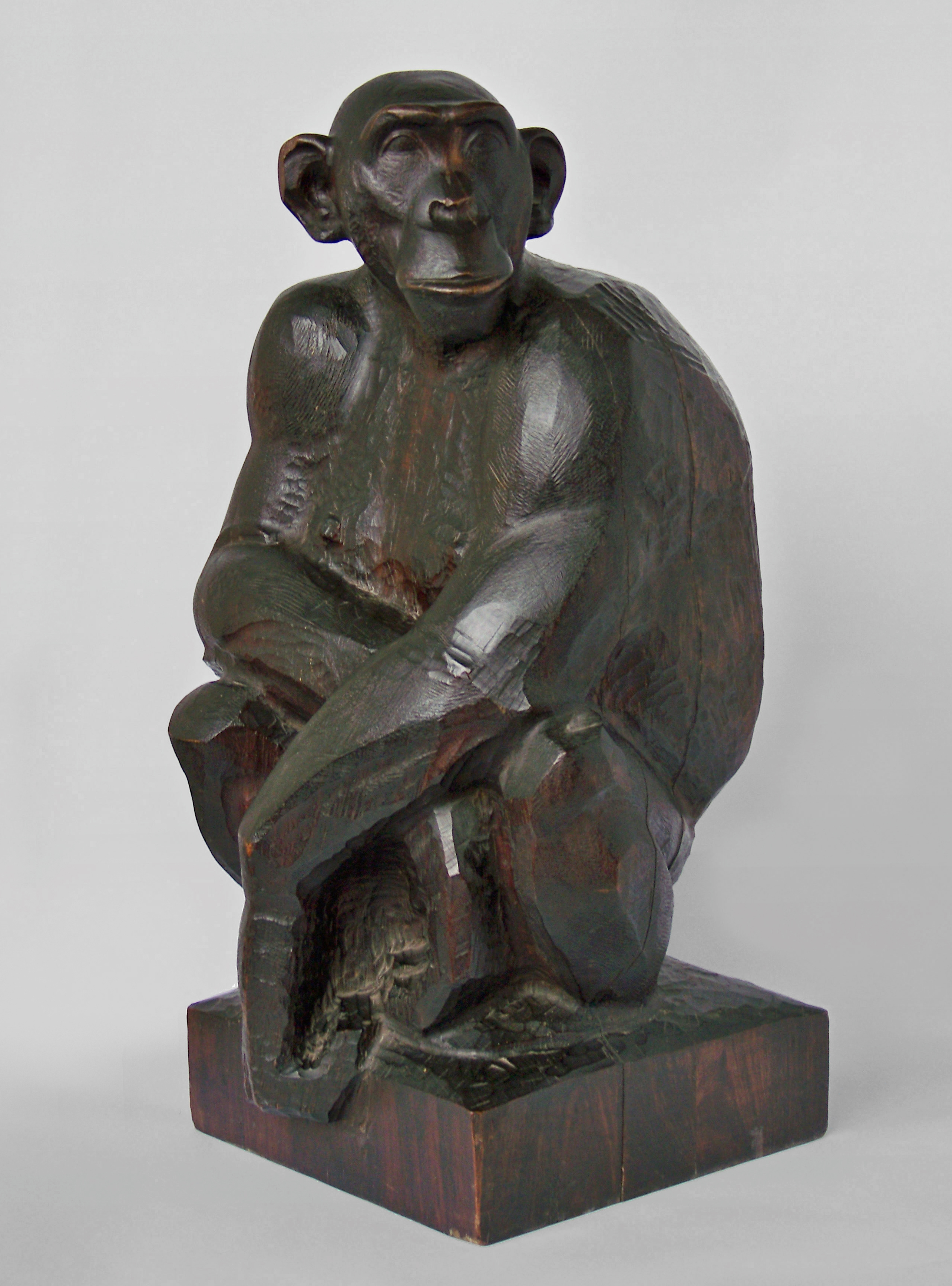 Anton Puchegger: Missie, um 1916/17 Zoologischer Garten Berlin AG